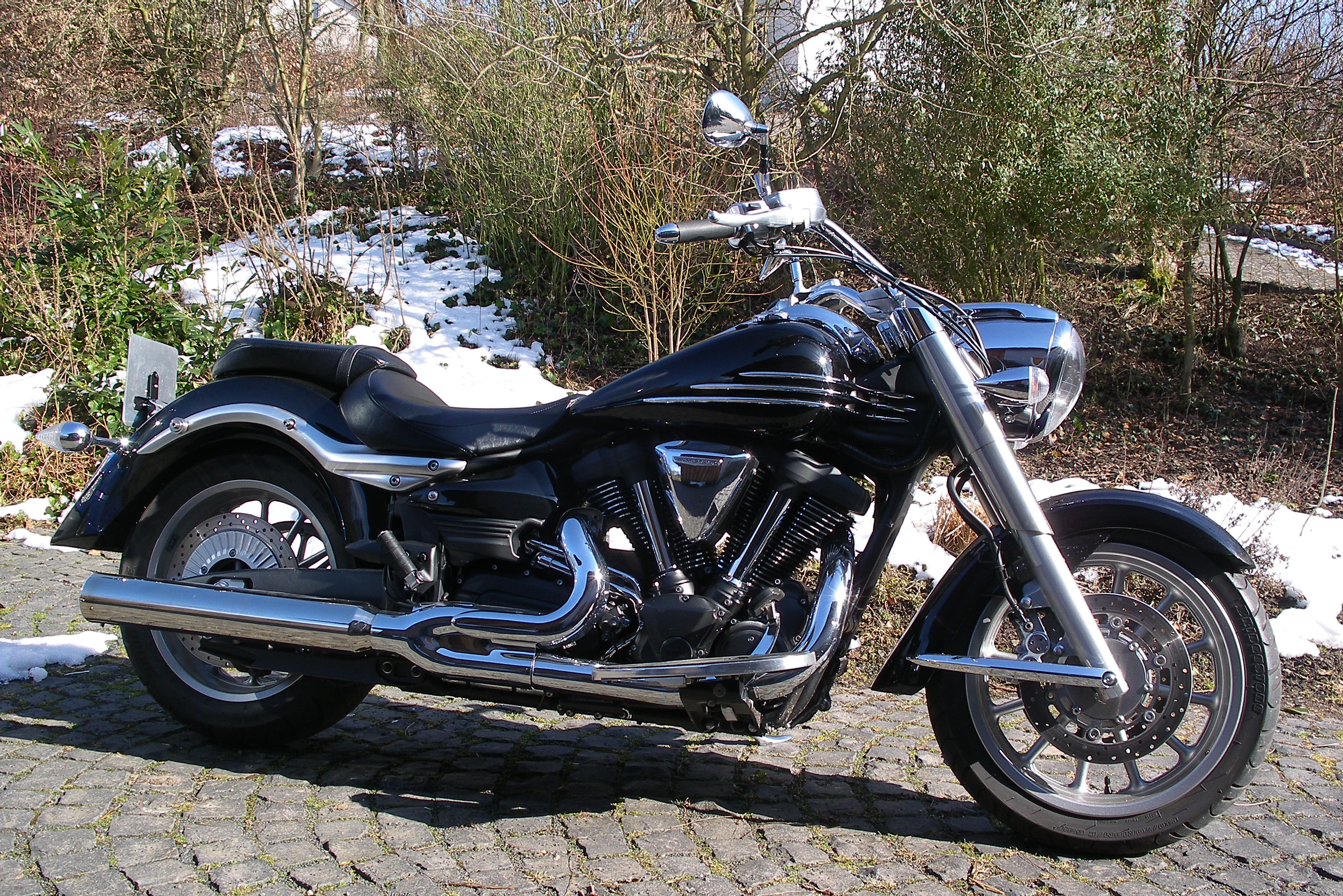 XV 1900 A Midnight Star, Bj. 2006